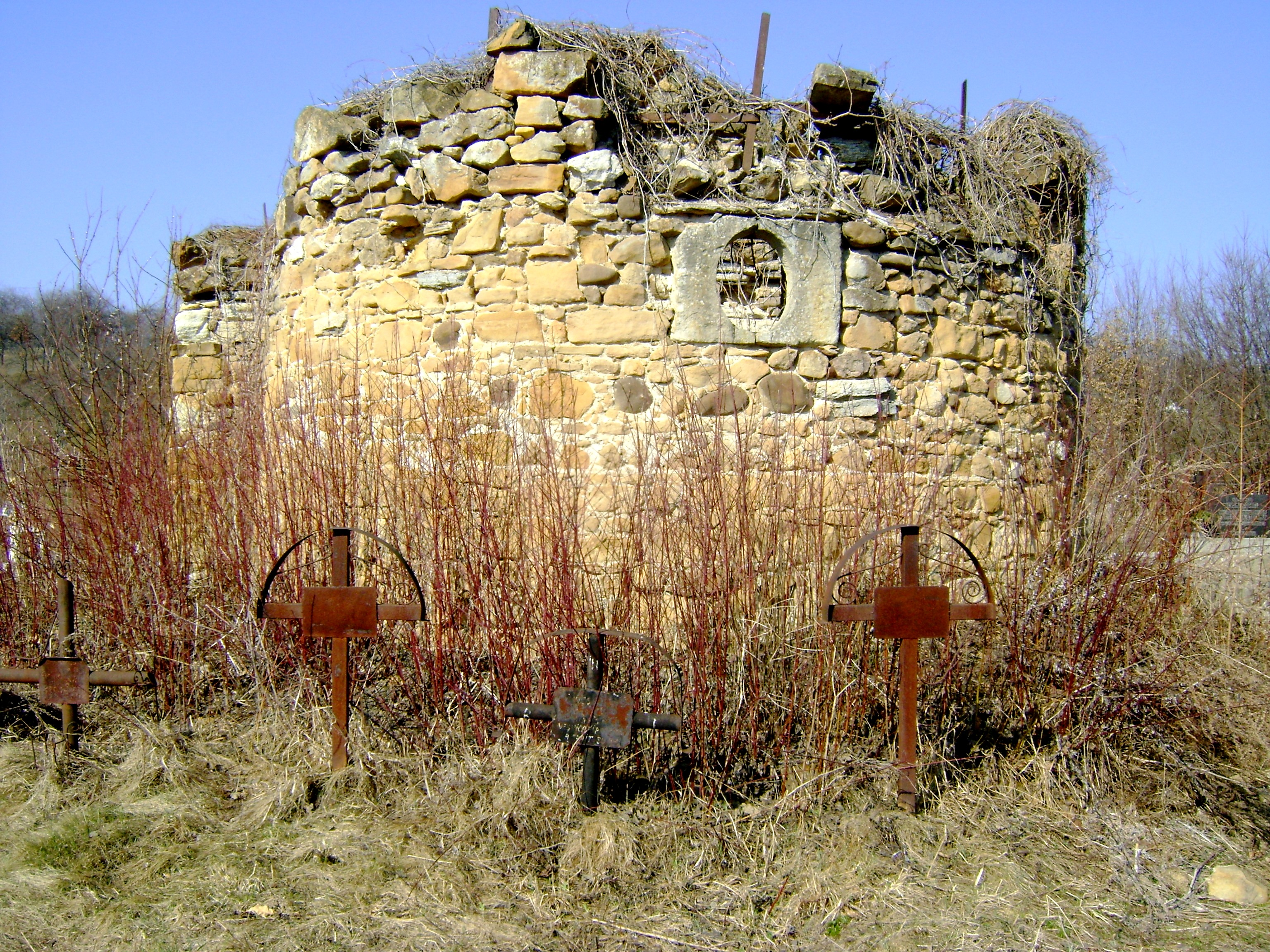 Ruinele bisericii „Cuvioasa Paraschiva”